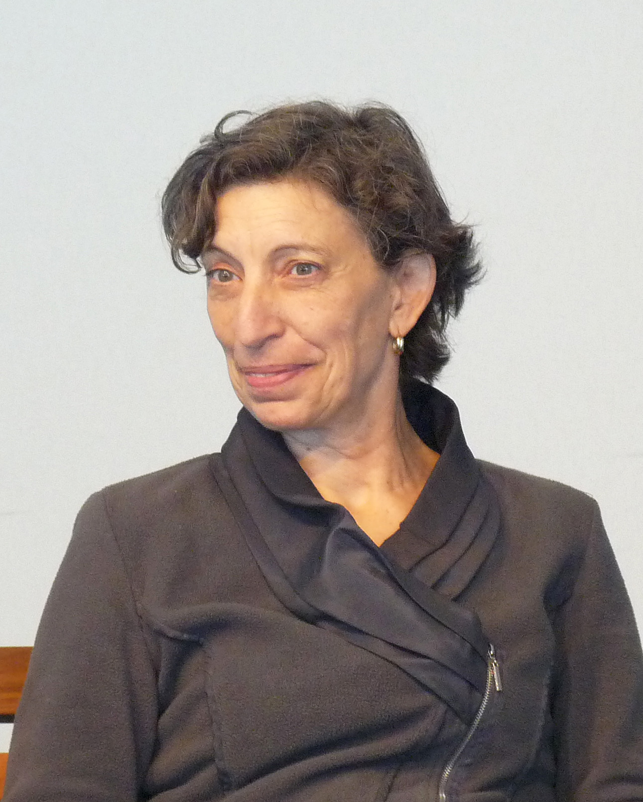 Barbara Constantine au Salon du livre en Bretagne (Vannes, Morbihan).